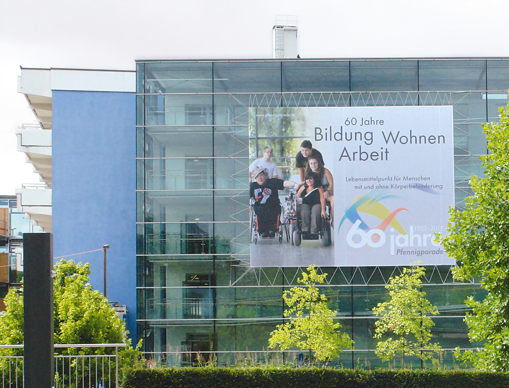 Schulgebäude der Stiftung Pfennigparade mit Plakat zur 60 Jahre Feier